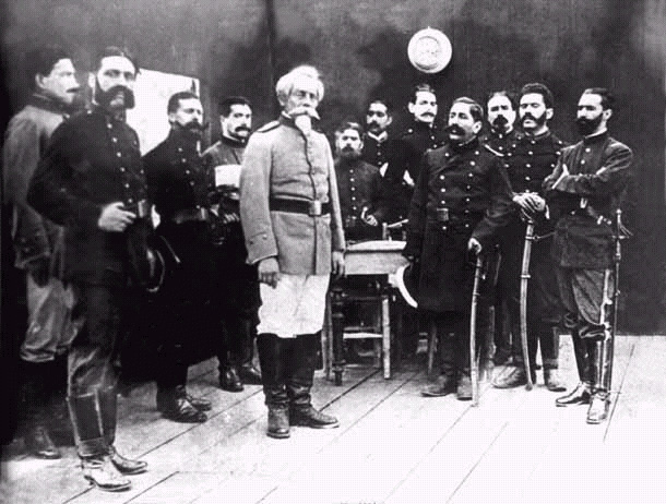 (de izq a der)1.- No identificado 2.- Teniente coronel Ramón Zavala 3.- Coronel Marcelino Verela Berrios 4.- No identificado 5.- Coronel Francisco Bolognesi Cervantes 6.- Teniente Coronel José de la Torre 7.- No identificado (parece ser Belahunde) 8.- Coronel Alfonso Ugarte Vernal 9.- Teniente Coronel Medardo Cornejo 10.- Coronel Justo Ariaz Araguez 11.- Teniente Coronel Ricardo O'Donovan Cordova 12.- Teniente Coronel Roque Saenz Peña